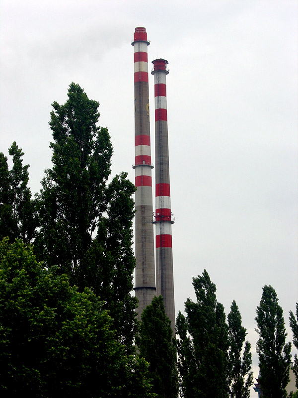 Komíny otrokovické teplárny